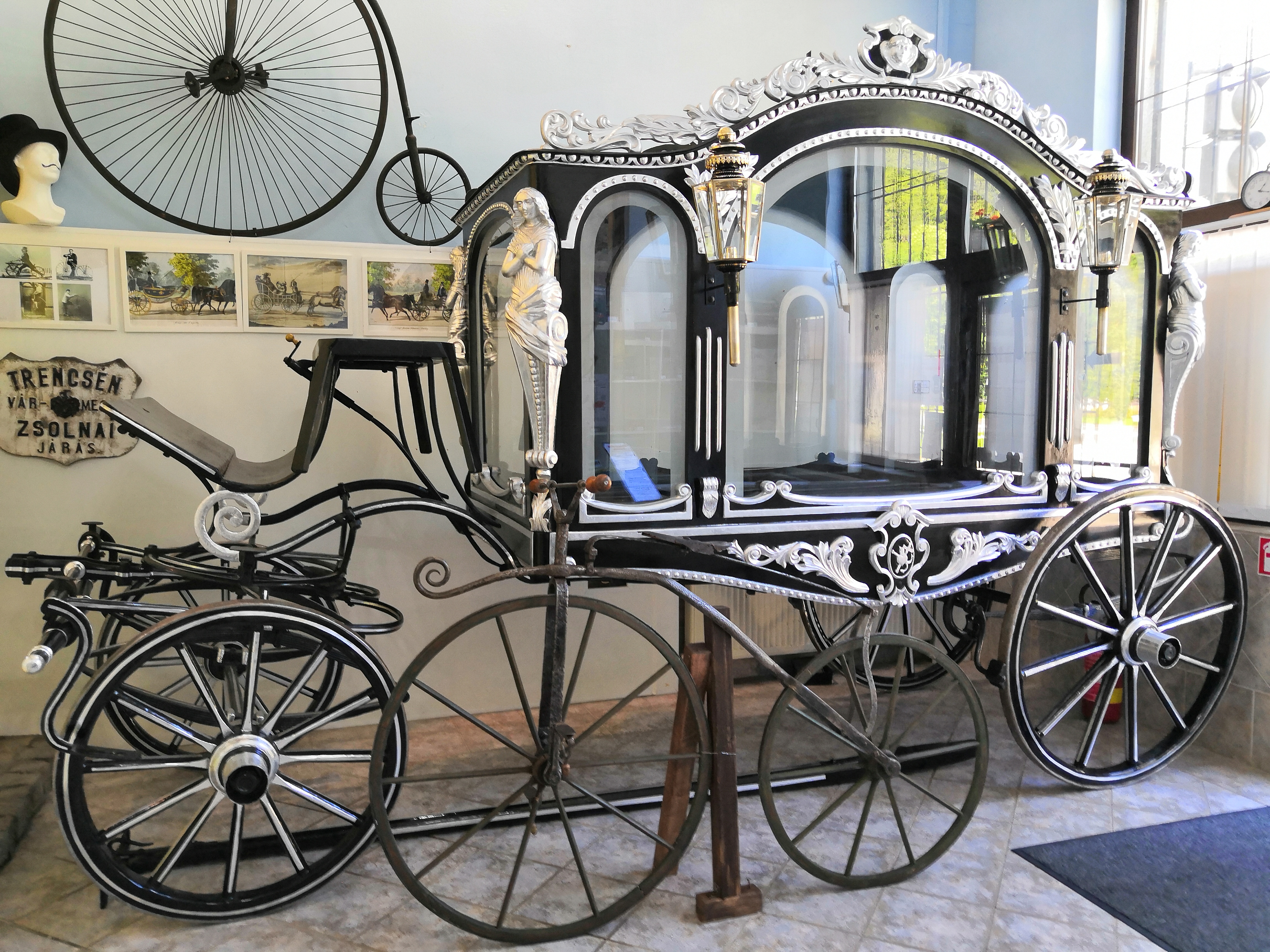 Pohrebný voz